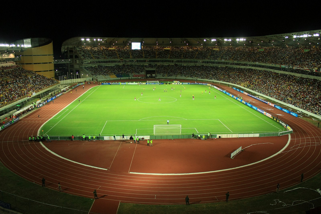 Vista nocturna del Estadio Cachamay (Ciudad Guayana, Venezuela)